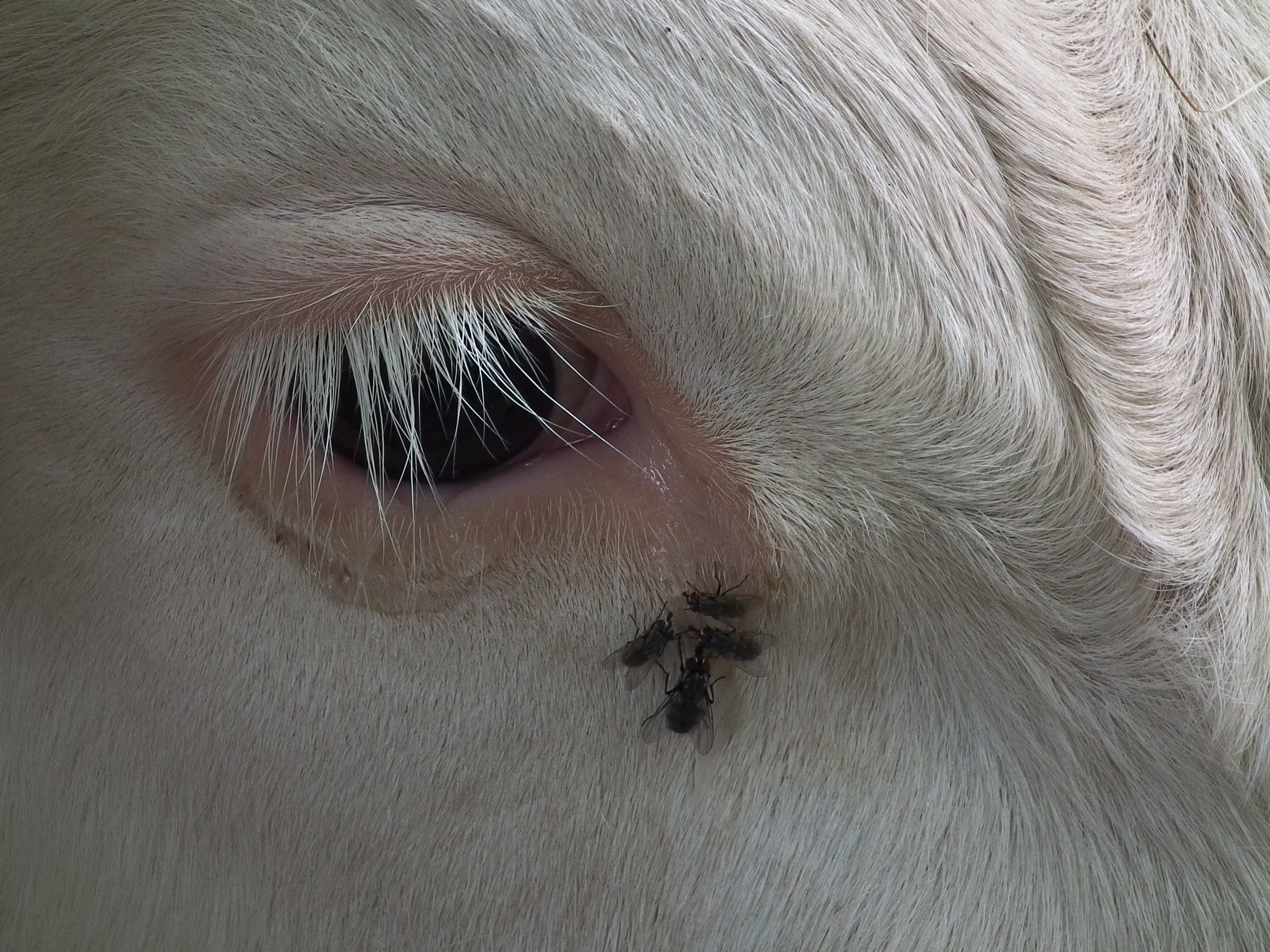 Auge eines Hinterwälder-Rinds mit vier Fliegen (Baden-Württemberg, Deutschland)